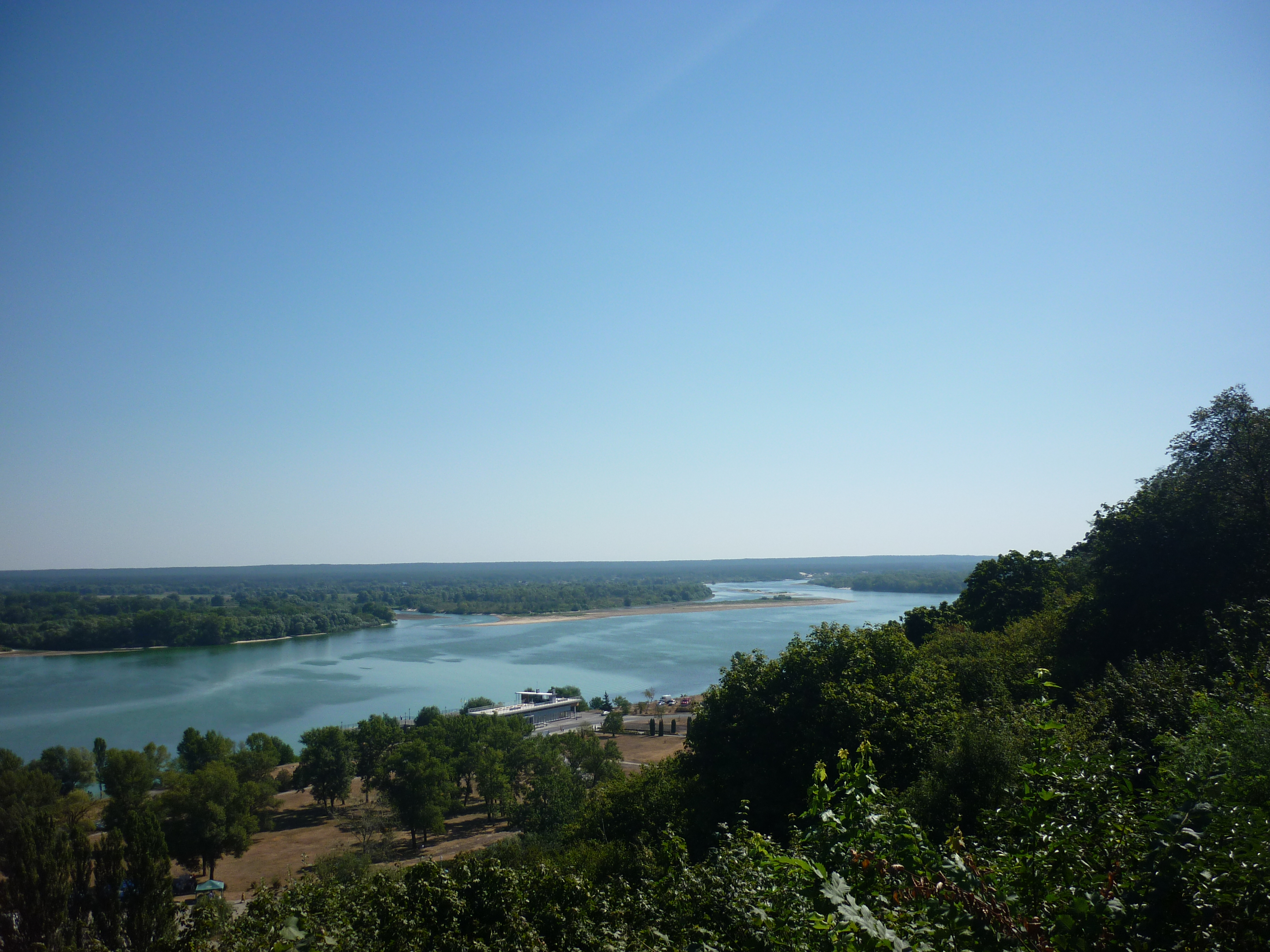 Вигляд на Дніпро з Тарасової гори